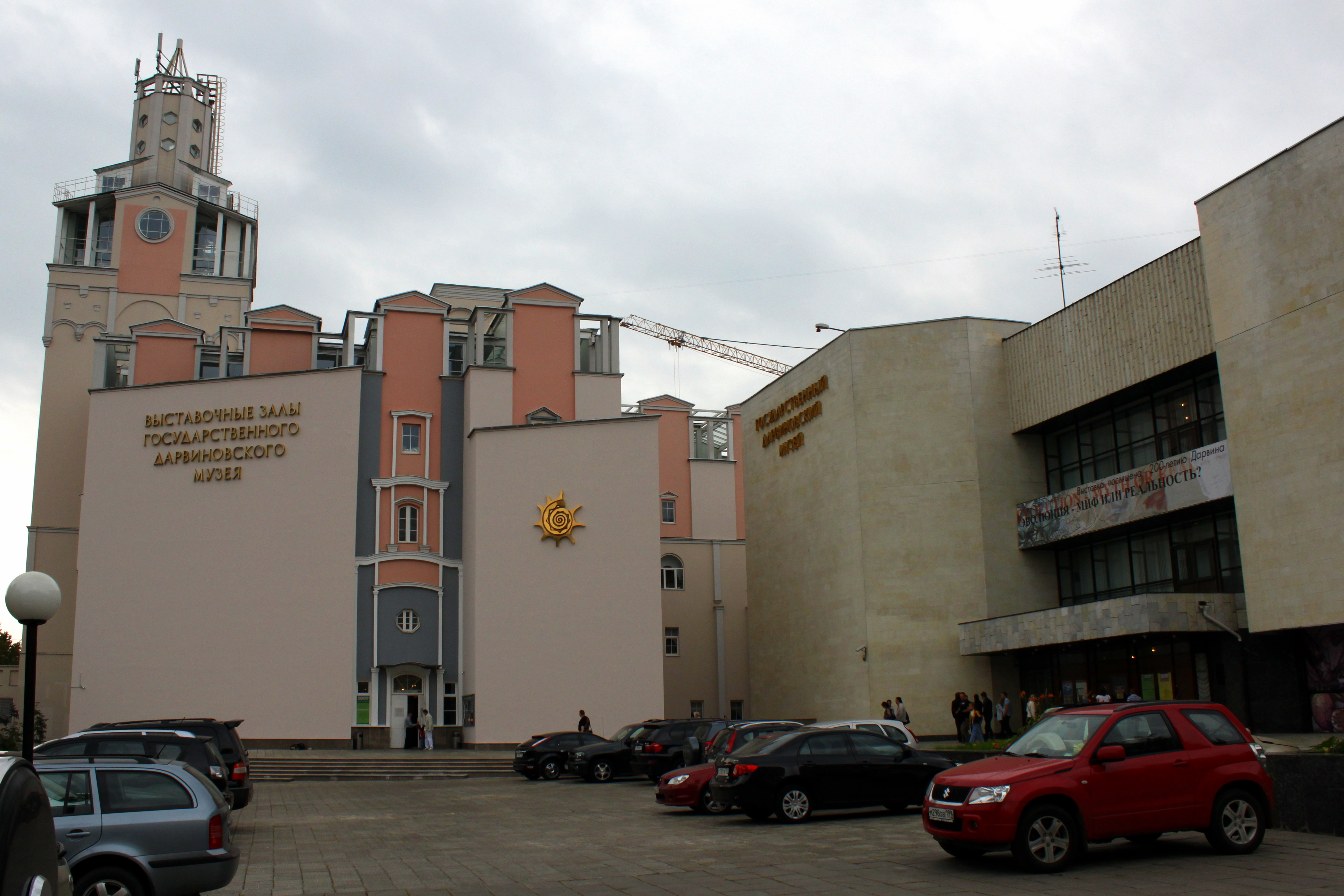 Здание Дарвиновского музея